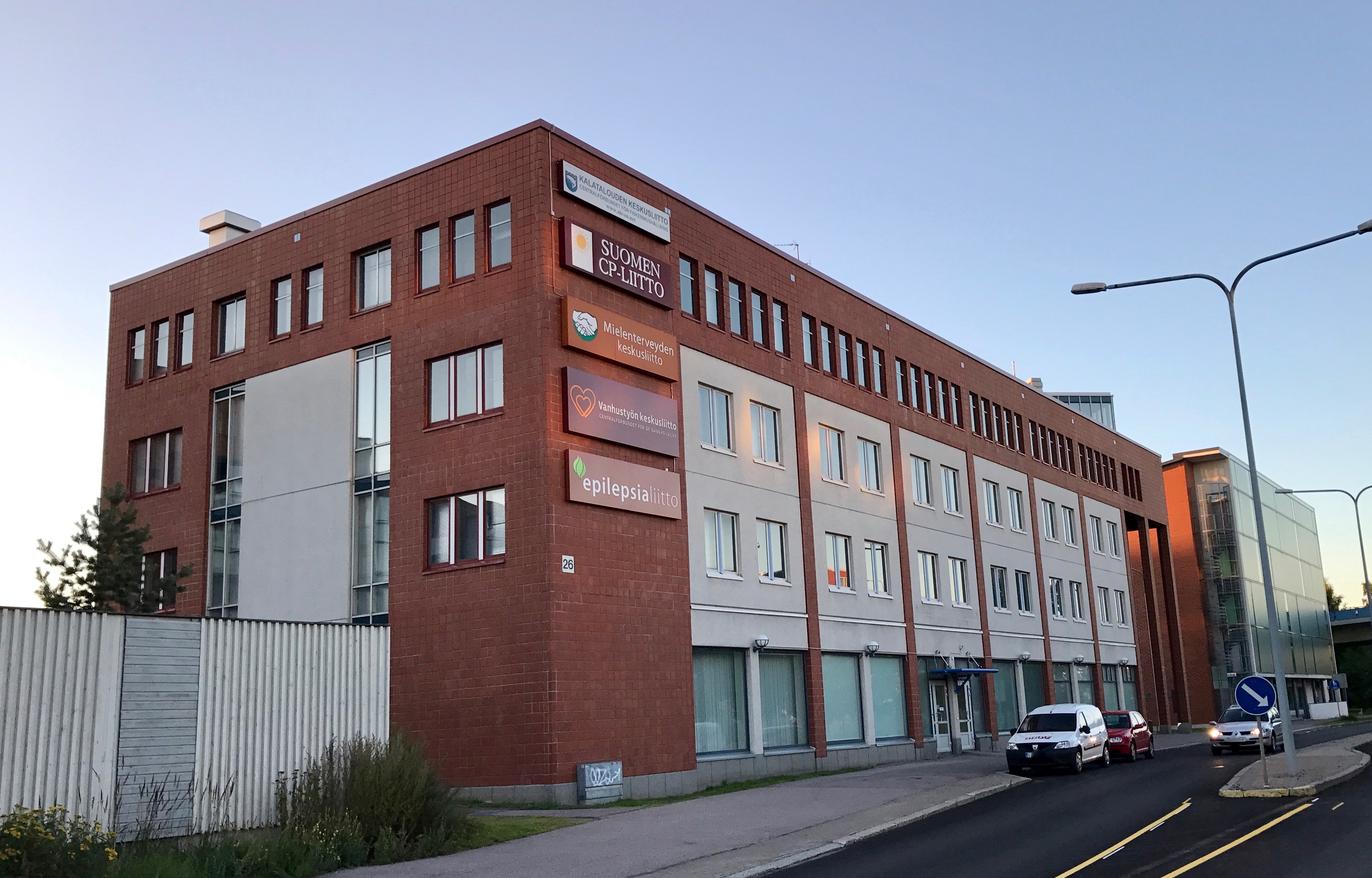 Toimistorakennus, osoite Malmin Kauppatie 26, Helsinki.